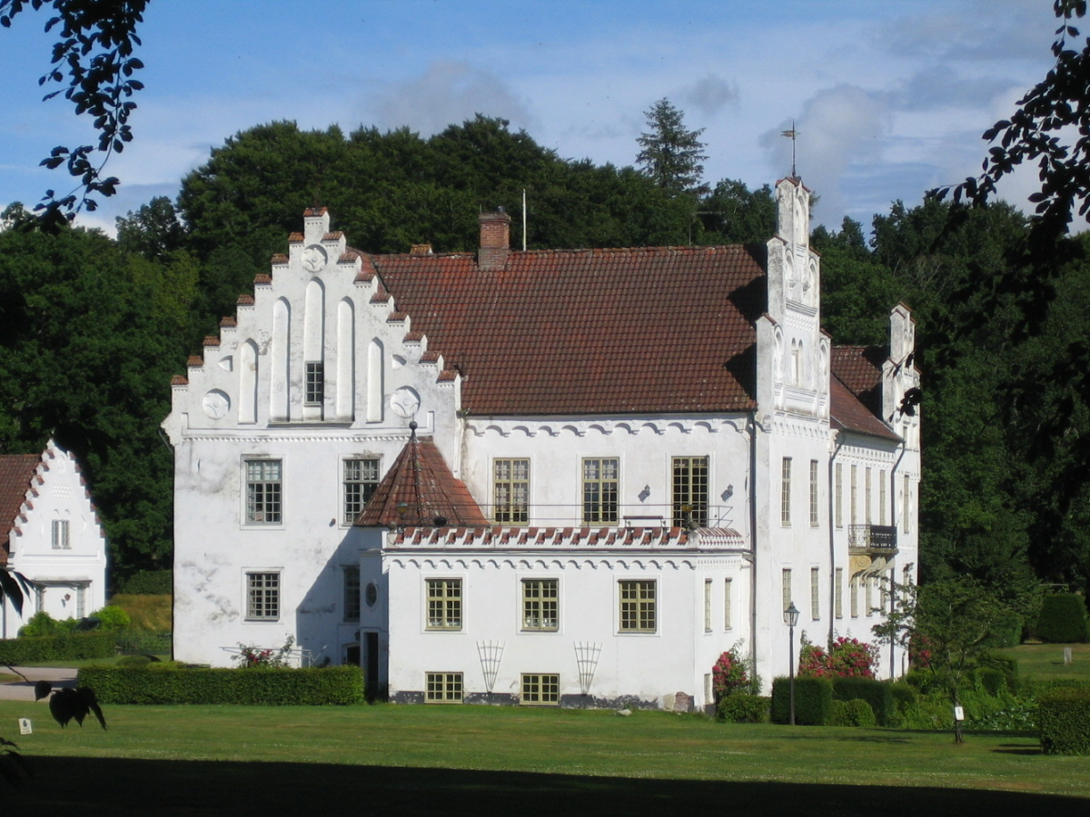 Vanås slott. Bilden tagen av mig själv 21 juli 2005.